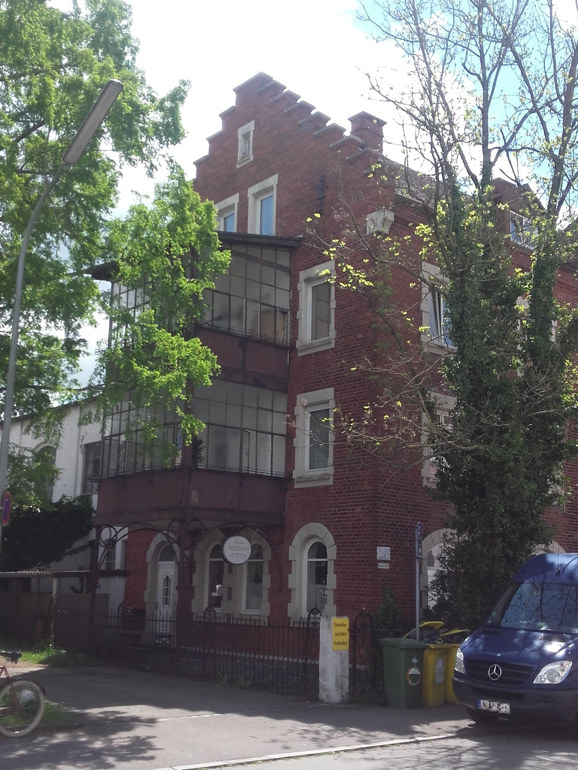 Blick auf das Verwaltungsgebäude der Frisch GmbH (ehemals Eisenwerk Gebrüder Frisch) in der Böheimstraße in Augsburg